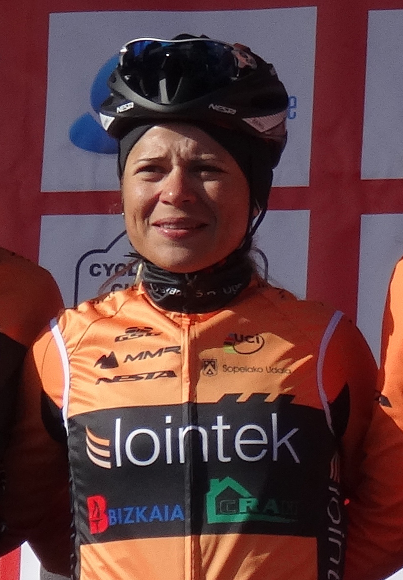 La ciclista Evelyn García